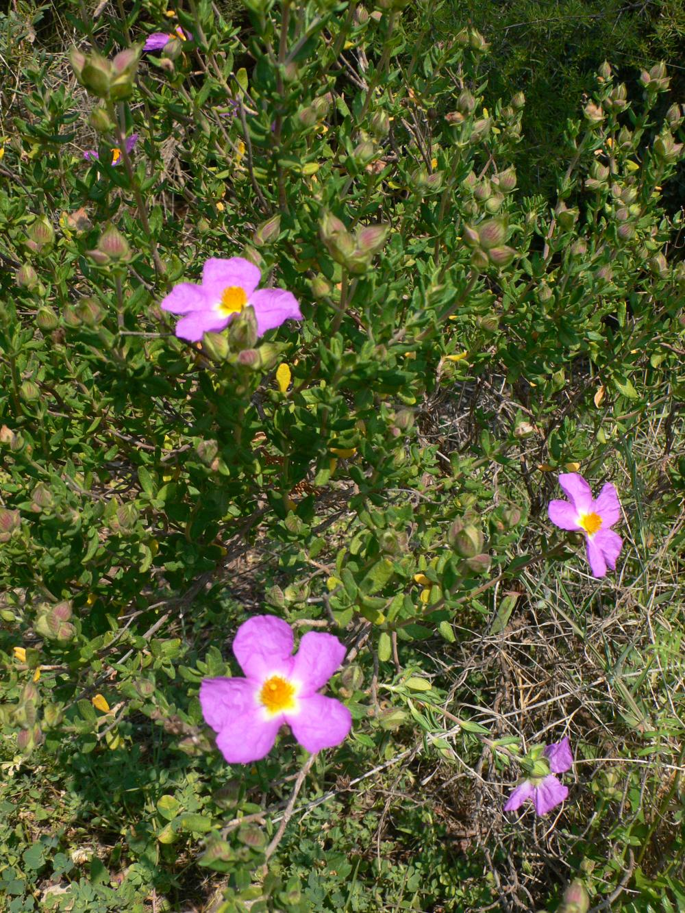 Cistus heterophyllus subsp.carthaginensis [Cistaceae]. Jara de cartagena. Especie en extremo peligro de extinción. Ejemplar de repoblación en la población de Canteras (Cartagena).